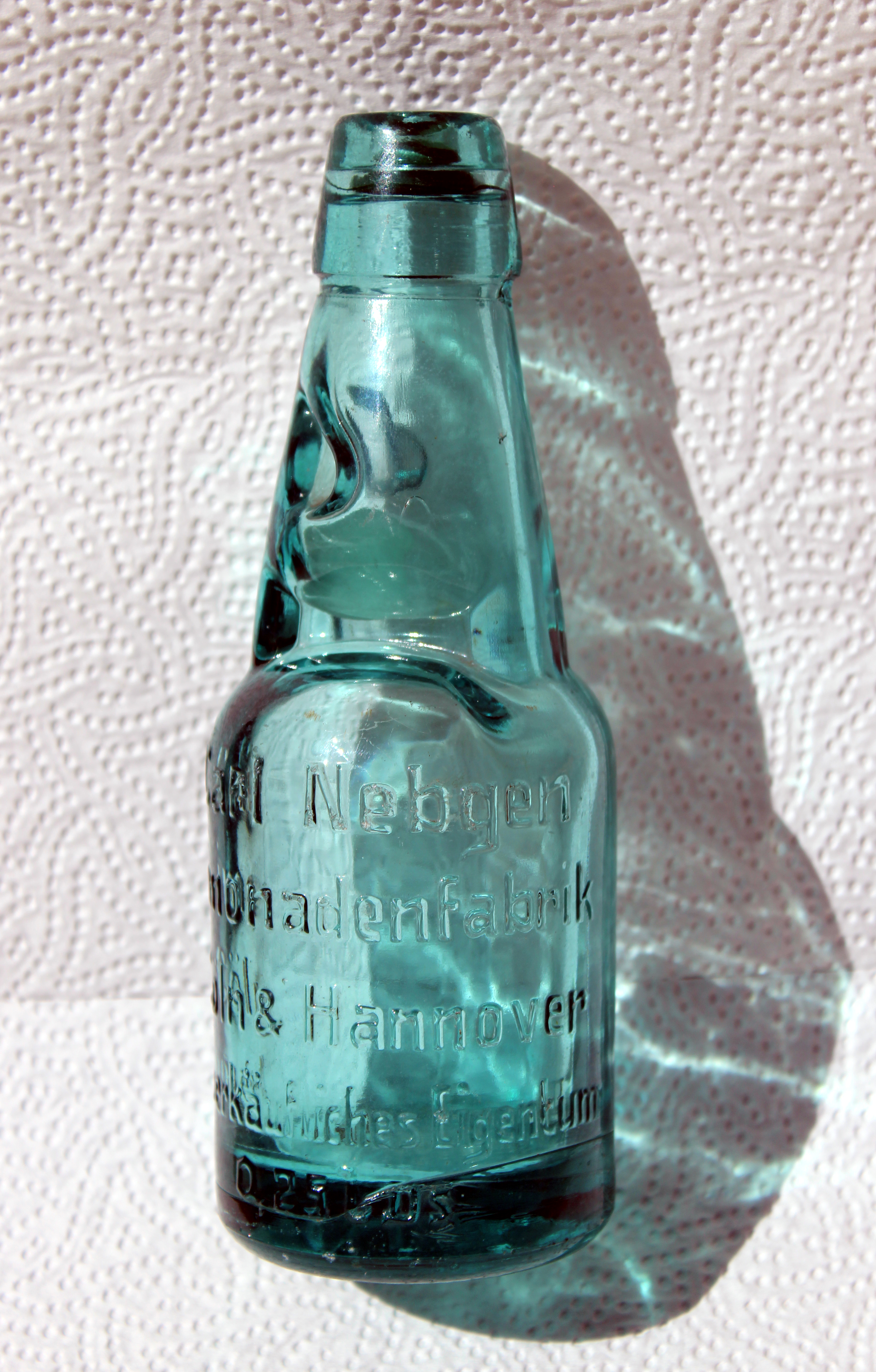 Eine Kugelverschluss- oder Knickerflasche der Firma „Carl Nebgen Limonadenfabrik Cöln & Hannover unverkäufliches Eigentum 0,25 lds“ Auf dem Flaschenboden finden sich die Initialen C. N. Im Hals der Flasche findet sich eine eine bewegliche Glaskugel, die vor dem Auslaufen der Flüssigkeit schützen soll, außerdem ein Gummiring ...